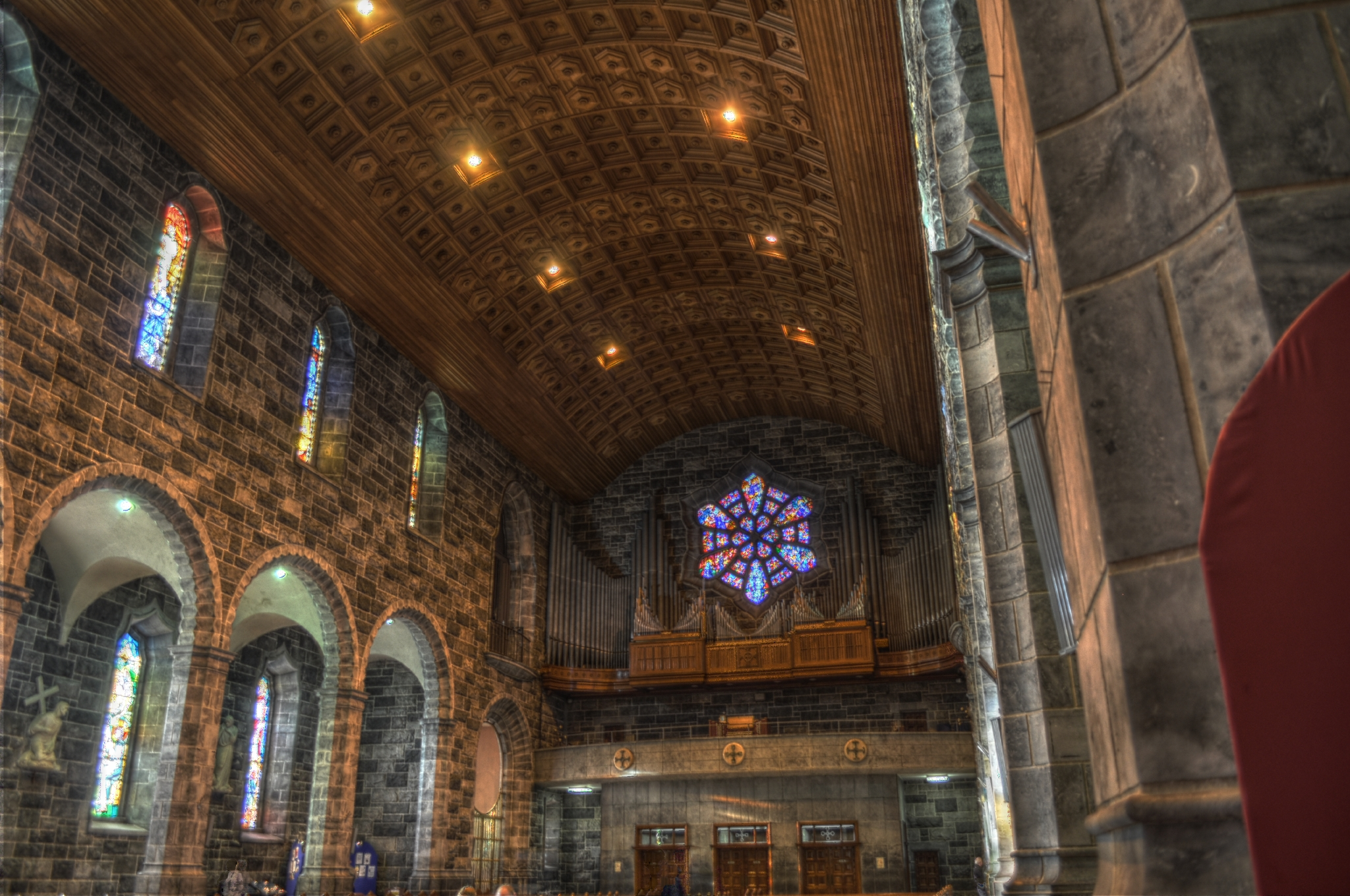 Camera: Nikon D5000 3 exposures: -2, 0, 2 EV Luminance HDR: Mantiuk'06